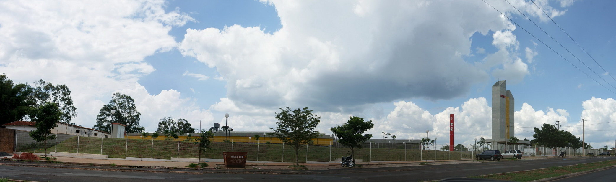 Imagem do município de Avaré, estado de São Paulo, Brasil.